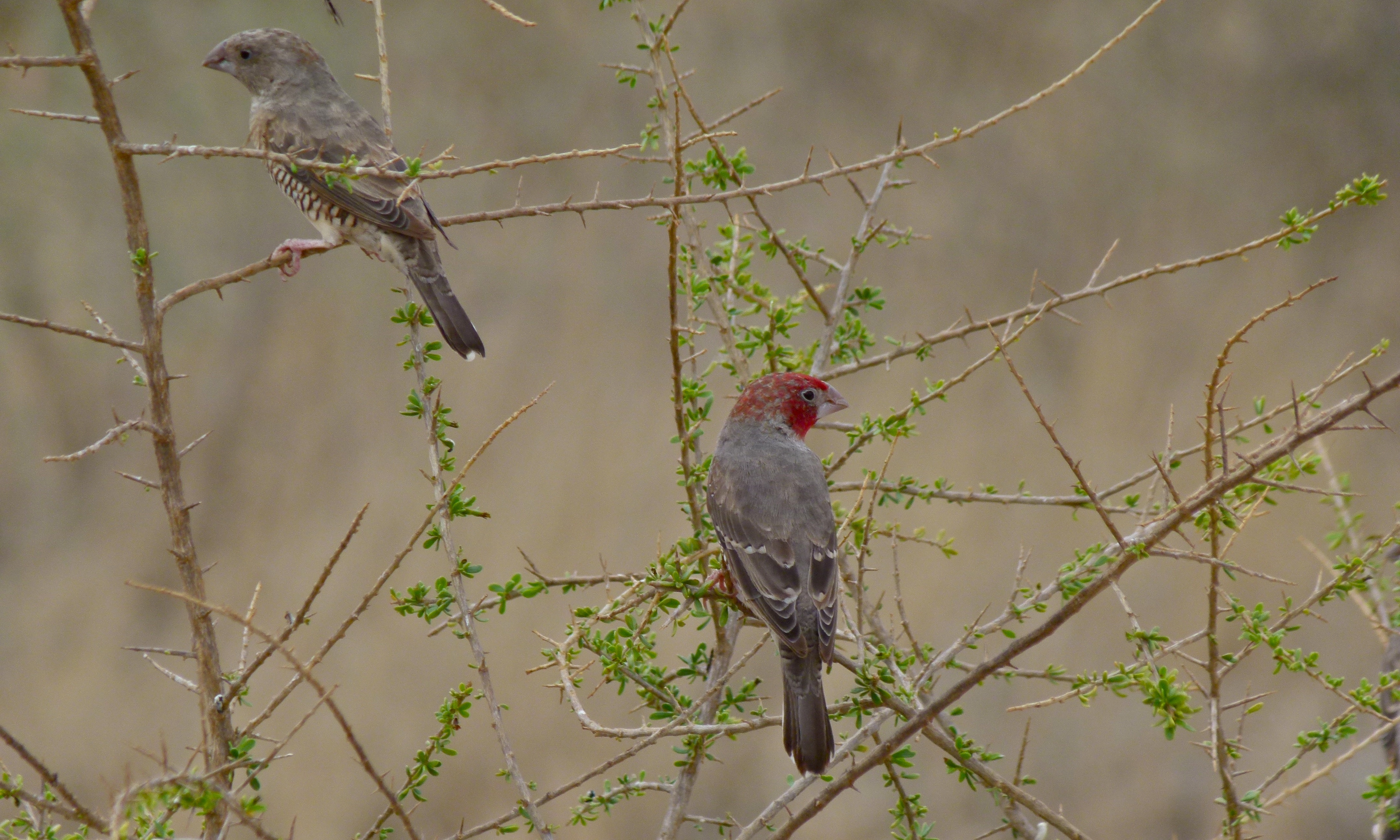 Kalahari Tented Camp, Kgalagadi Transfrontier Park, SOUTH AFRICA